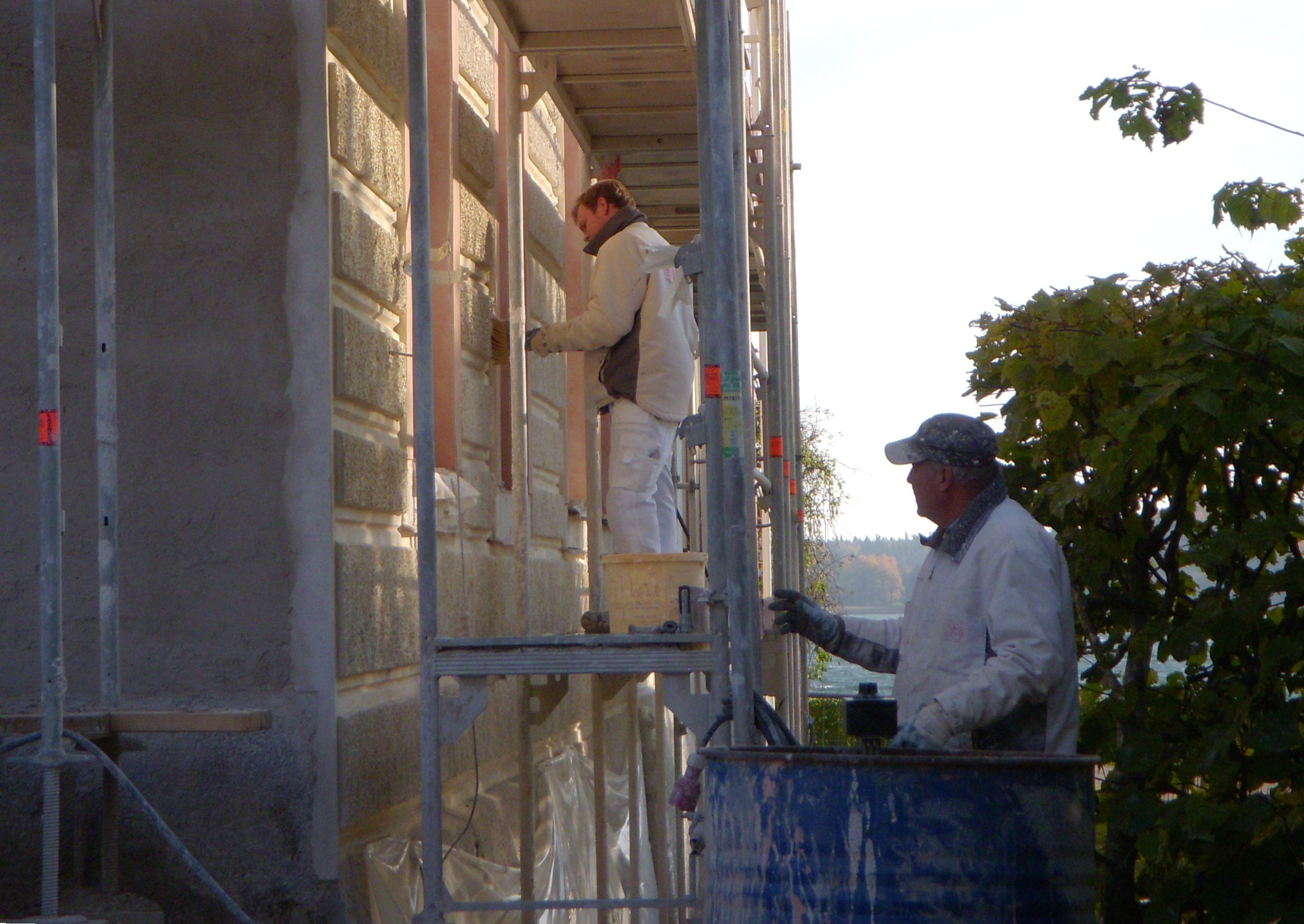 Tullgarns slott, fasadrenovering oktober 2011